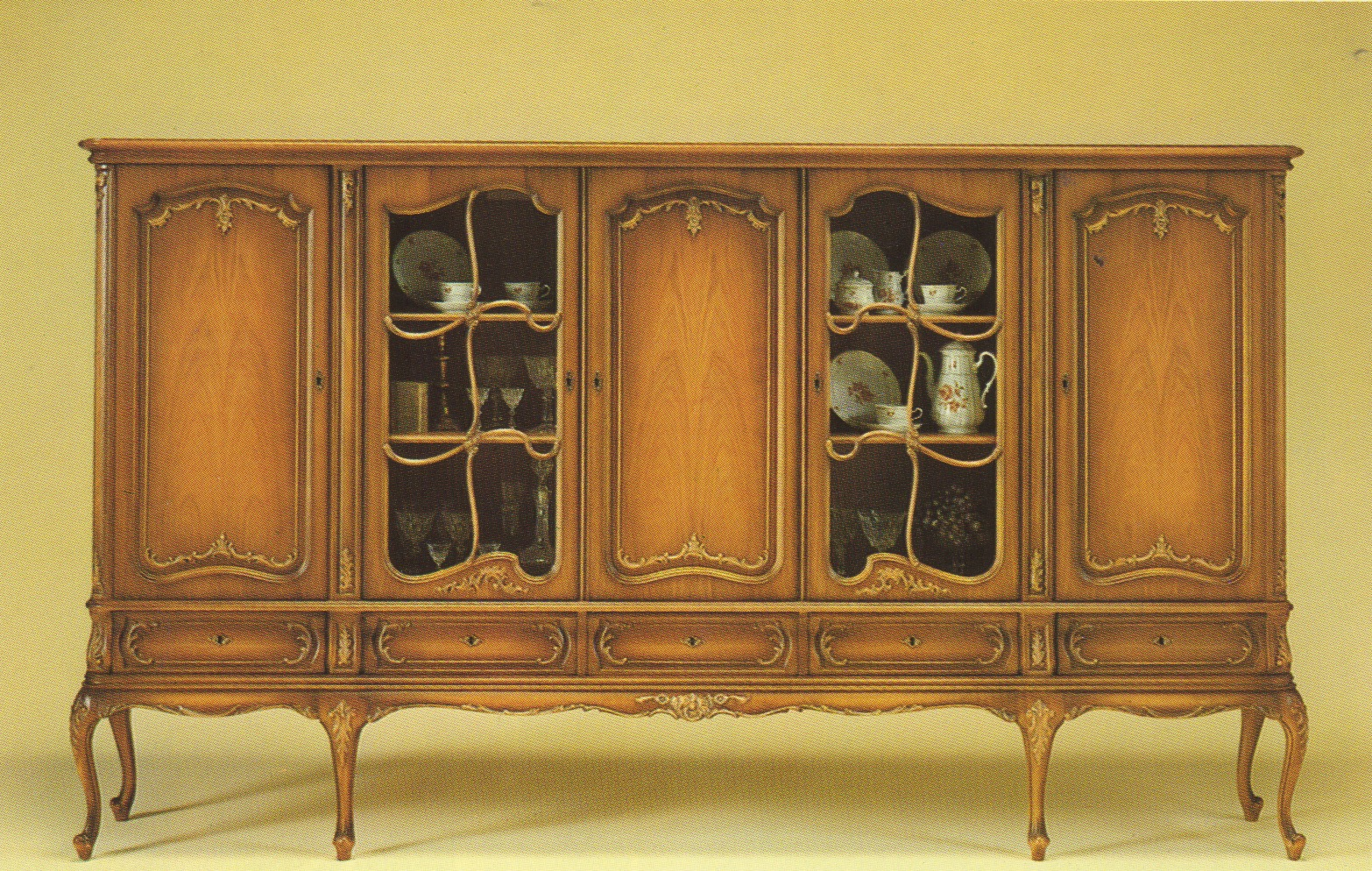 Wohnzimmerschrank Barock, 1960er Jahre, Warrings KG Möbelfabrik, Bremerhaven